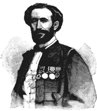 "M. Giquel, constructeur de l'arsenal de Fou-Tchéou".